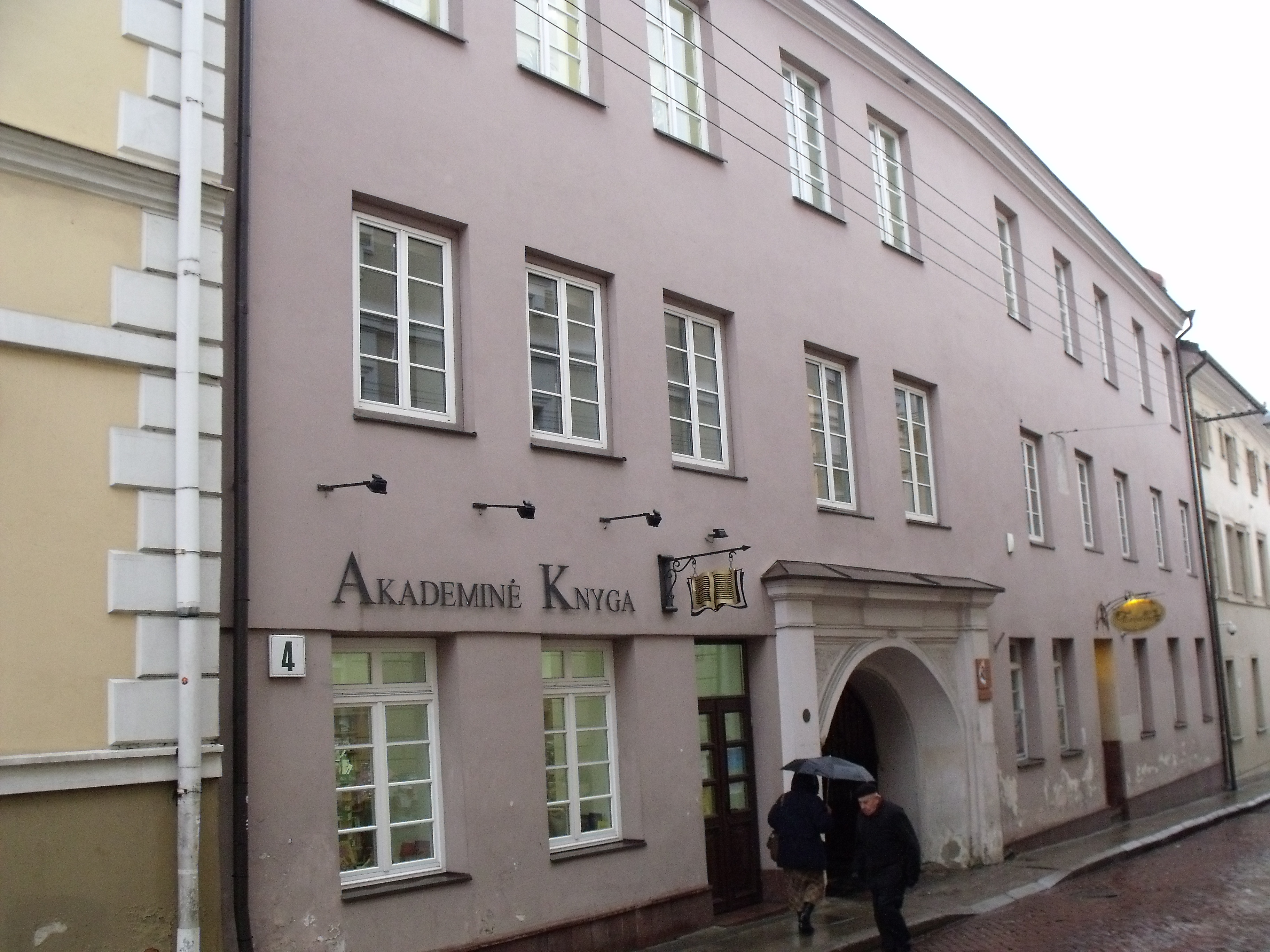 Дом на уліцы Універсітэцкай, 4 у Вільні, дзе ў 1906-1911 гг. існавала друкарня Марціна Кухты.